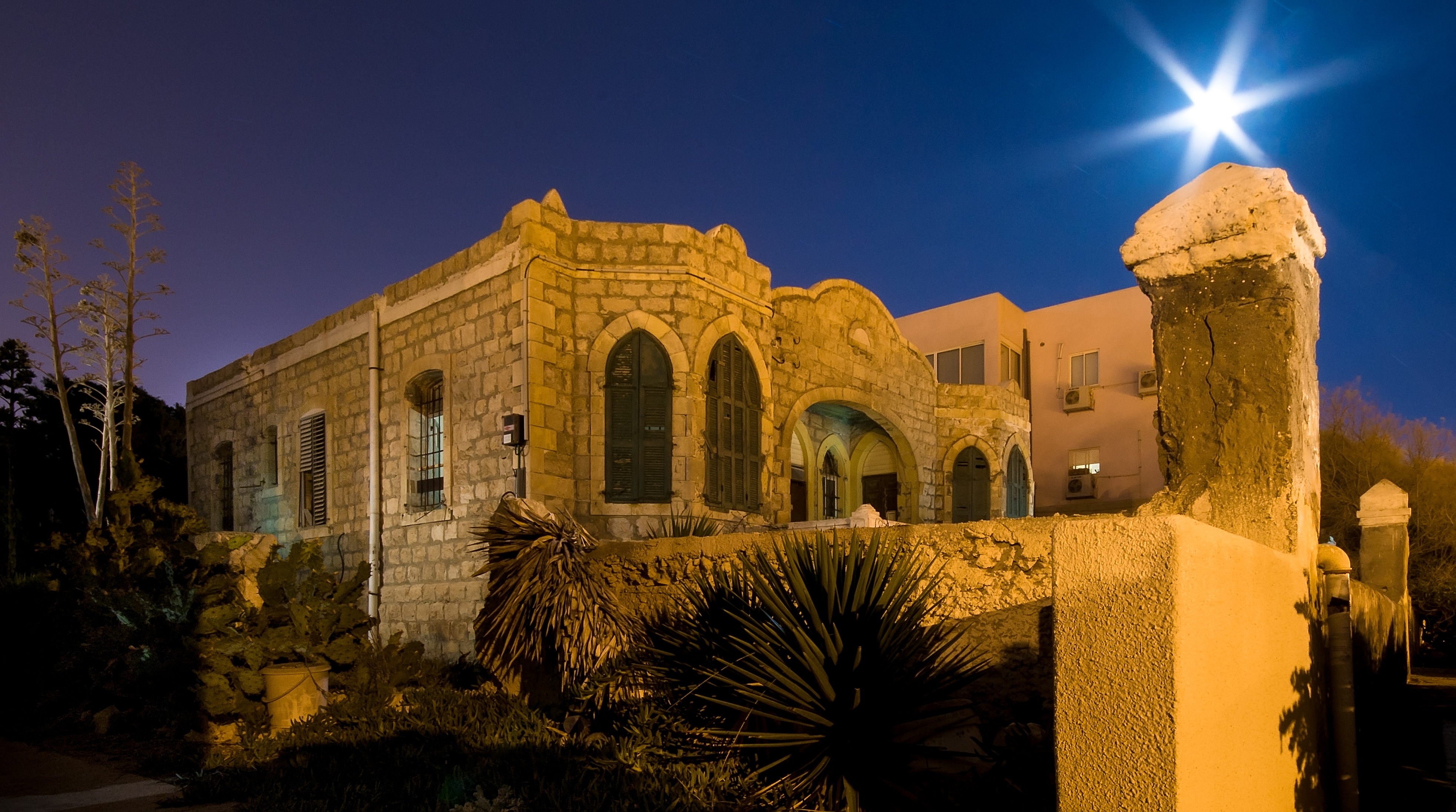 בית חמאוי בחיפה